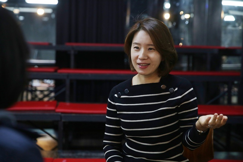 나루토 사쿠라-마이리클포니 래리티 여민정 성우 인터뷰